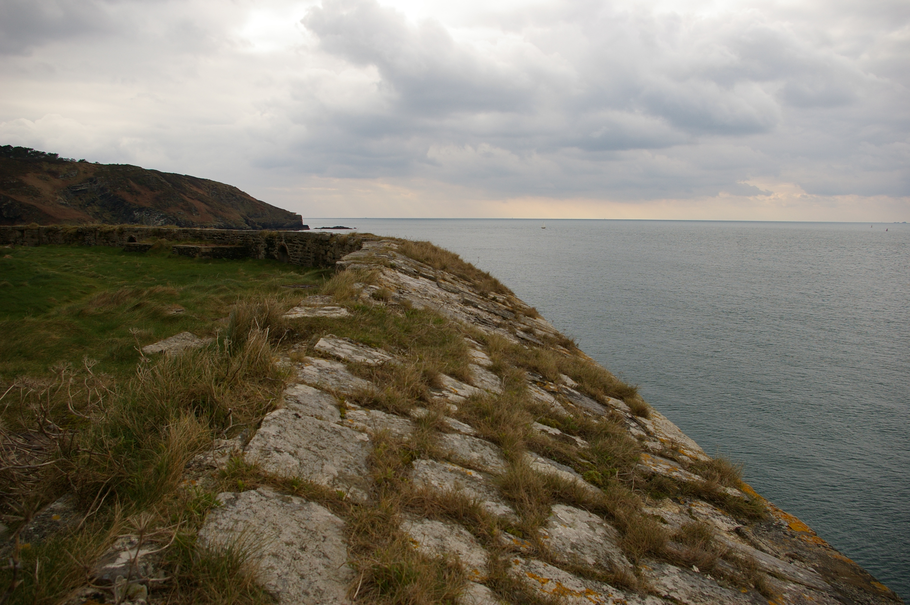 Glacis de la batterie de Cornouaille